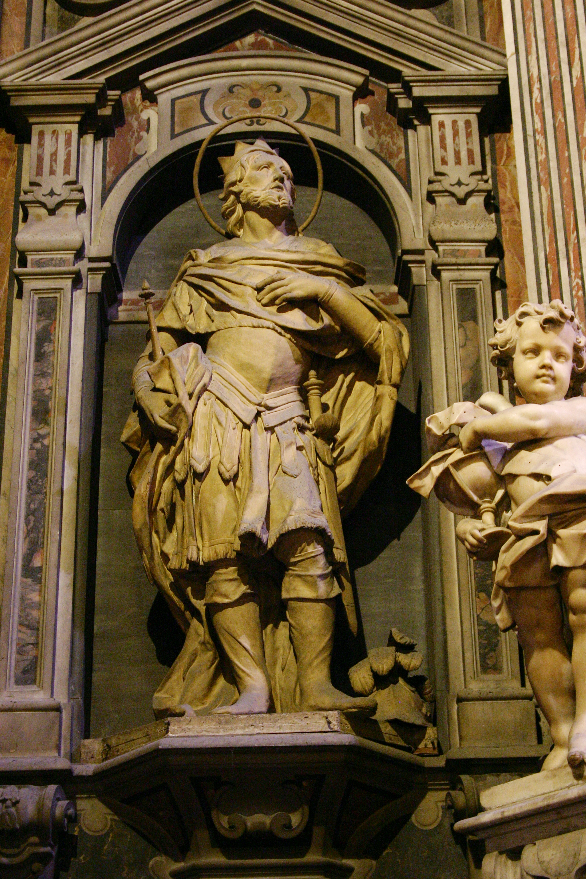 San Ferdinando, Nápoles